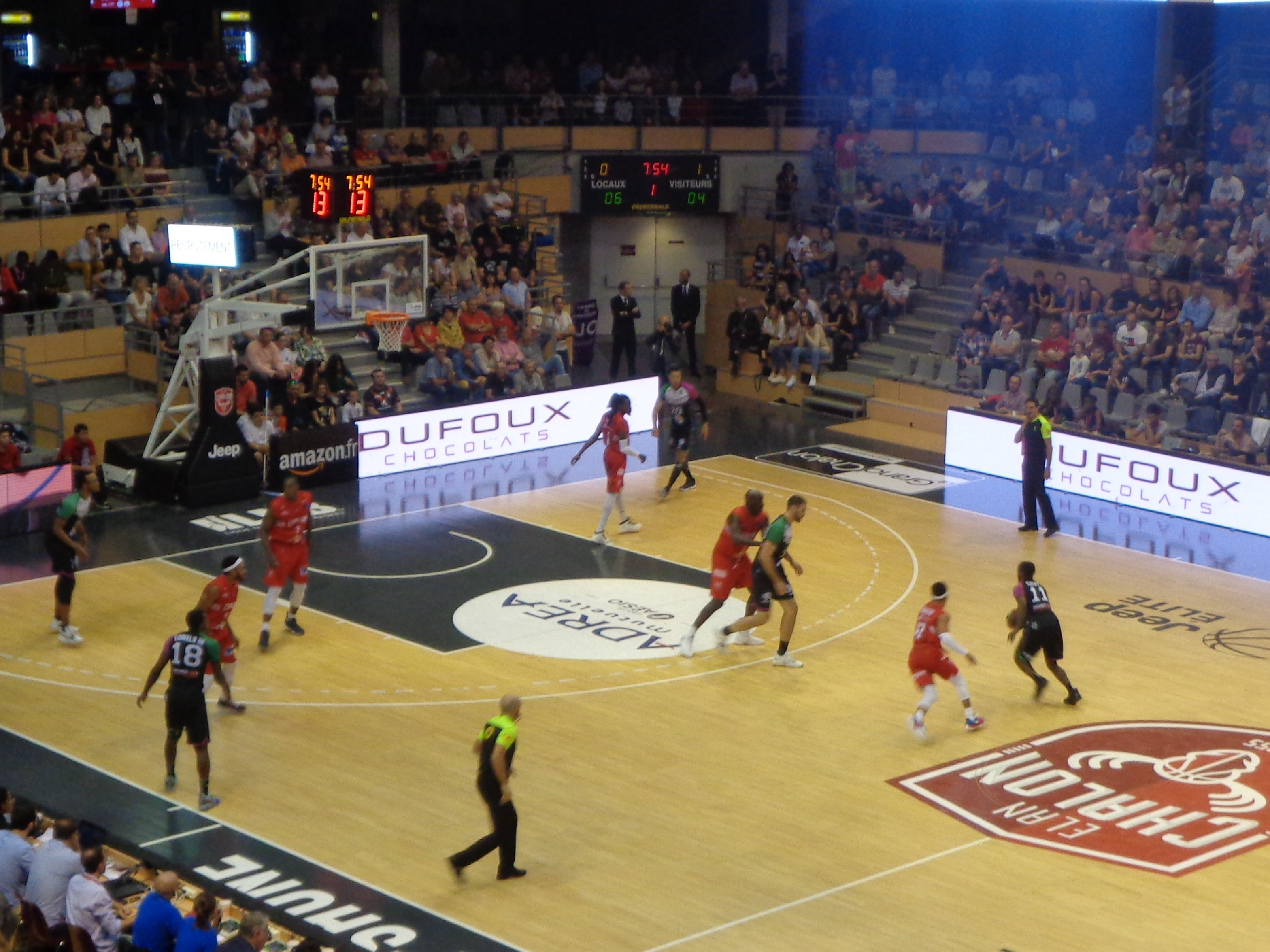 Match de Pro A entre l'Elan Chalon et Boulazac au Colisée de Chalon-sur-Saône.